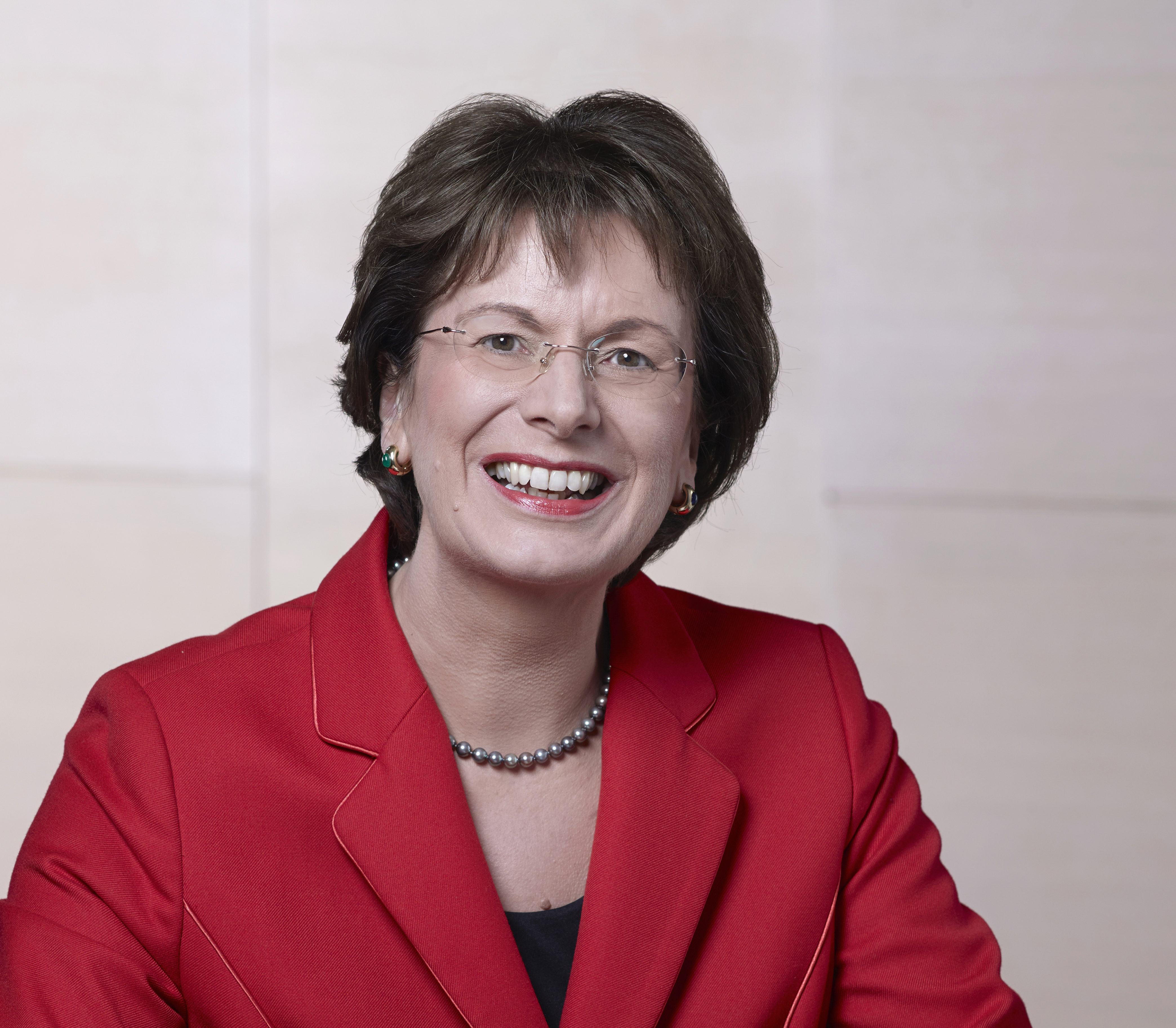 Marie-Luise Dött, MdB (2013)